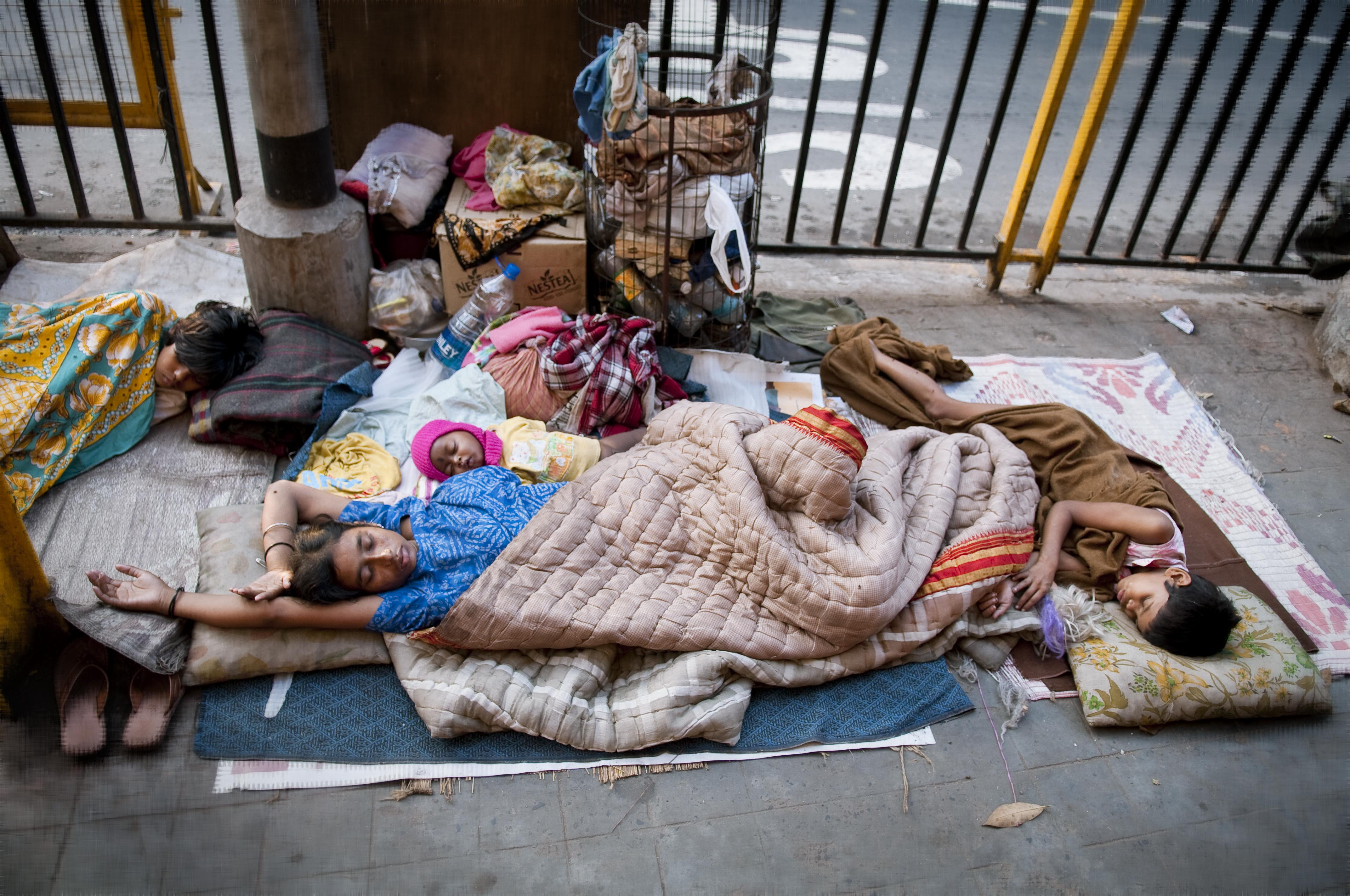 Kolkata